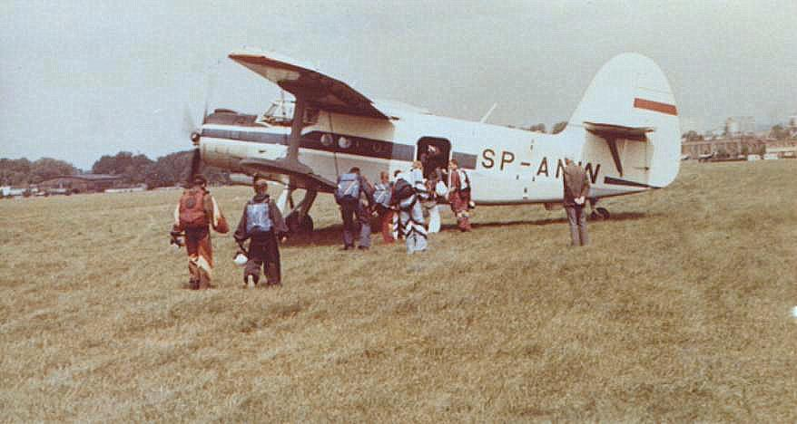 XV Spadochronowe Mistrzostwa Śląska Gliwice 1984, An-2TD SP-ANW - Sekcja Spadochronowa Aeroklubu Gliwickiego